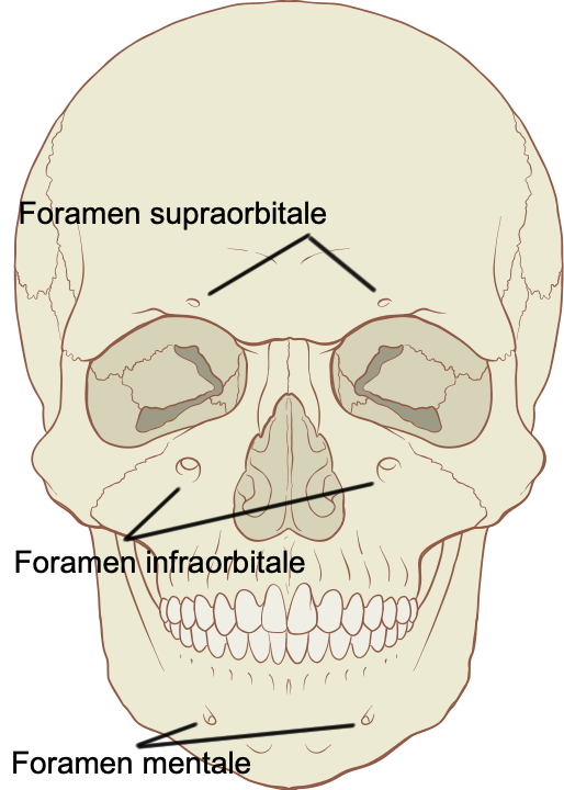 Foramen mentale, infraorbitale, supraorbitale